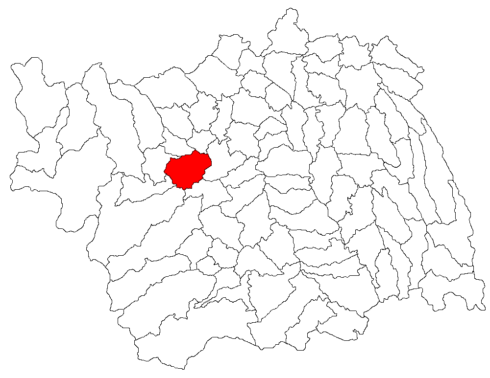 Categorie:Hărţi ale judeţului Bacău